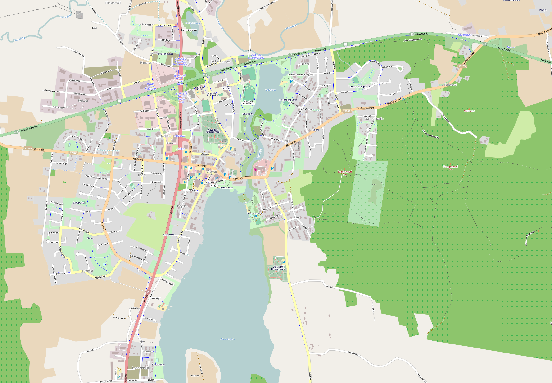 Alavuden kartta 7/2013